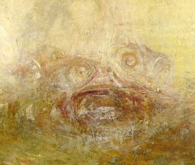 detail